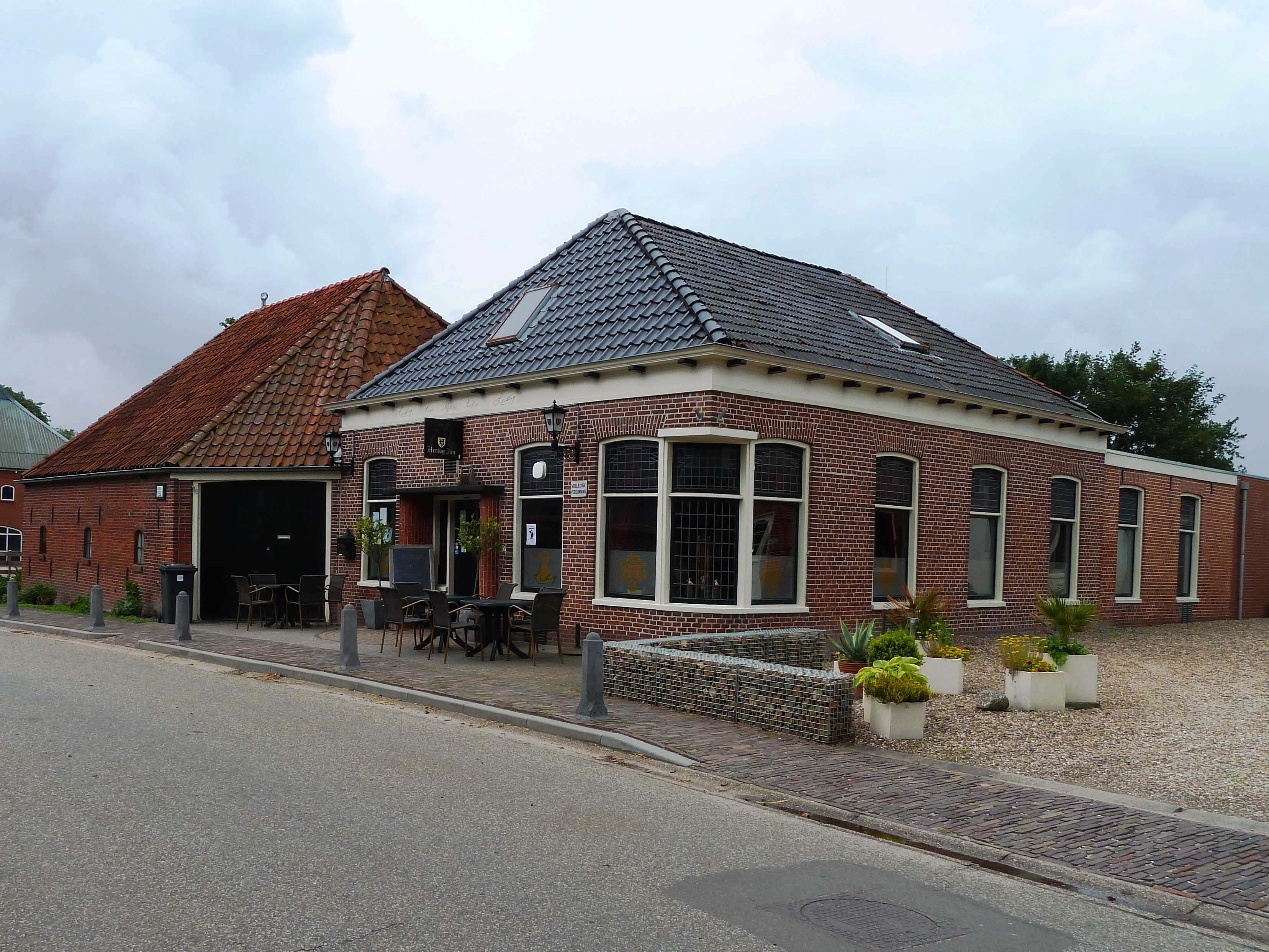 Café Lanting in Meedhuizen.